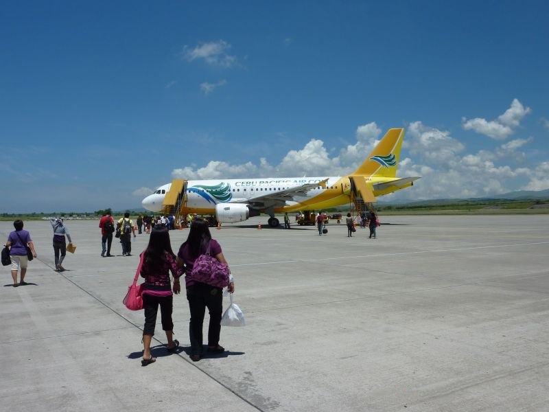 Flughafen Gensan